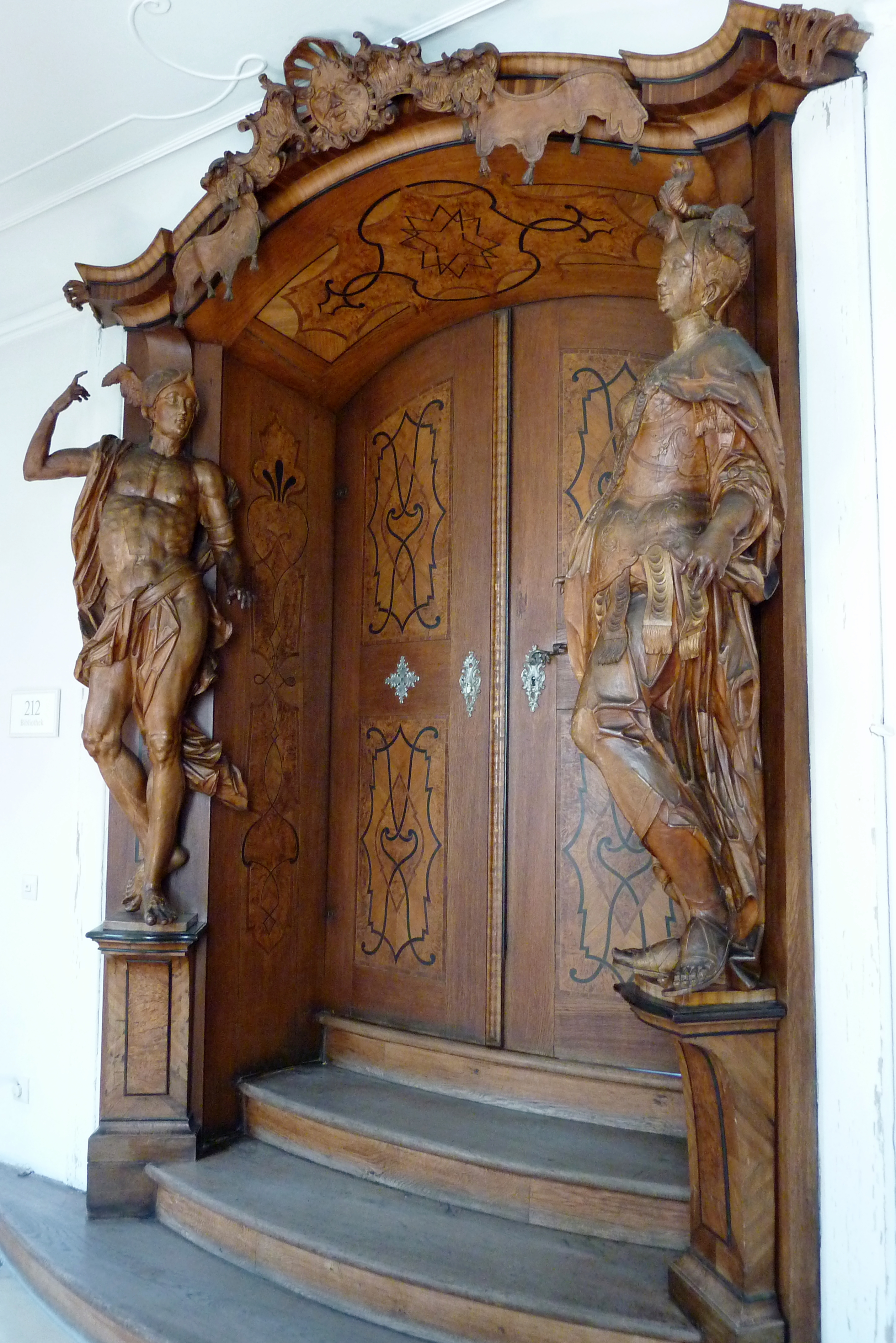 Ehemalige Universitätsbibliothek aus dem frühen 18. Jahrhundert, in der Akademie für Lehrerfortbildung und Personalführung in Bayern in Dillingen an der Donau (Bayern), holzgeschnitzte Tür mit Skulpturen von Johann Georg Bschorer (1692–1763), Darstellung: Merkur und Minerva